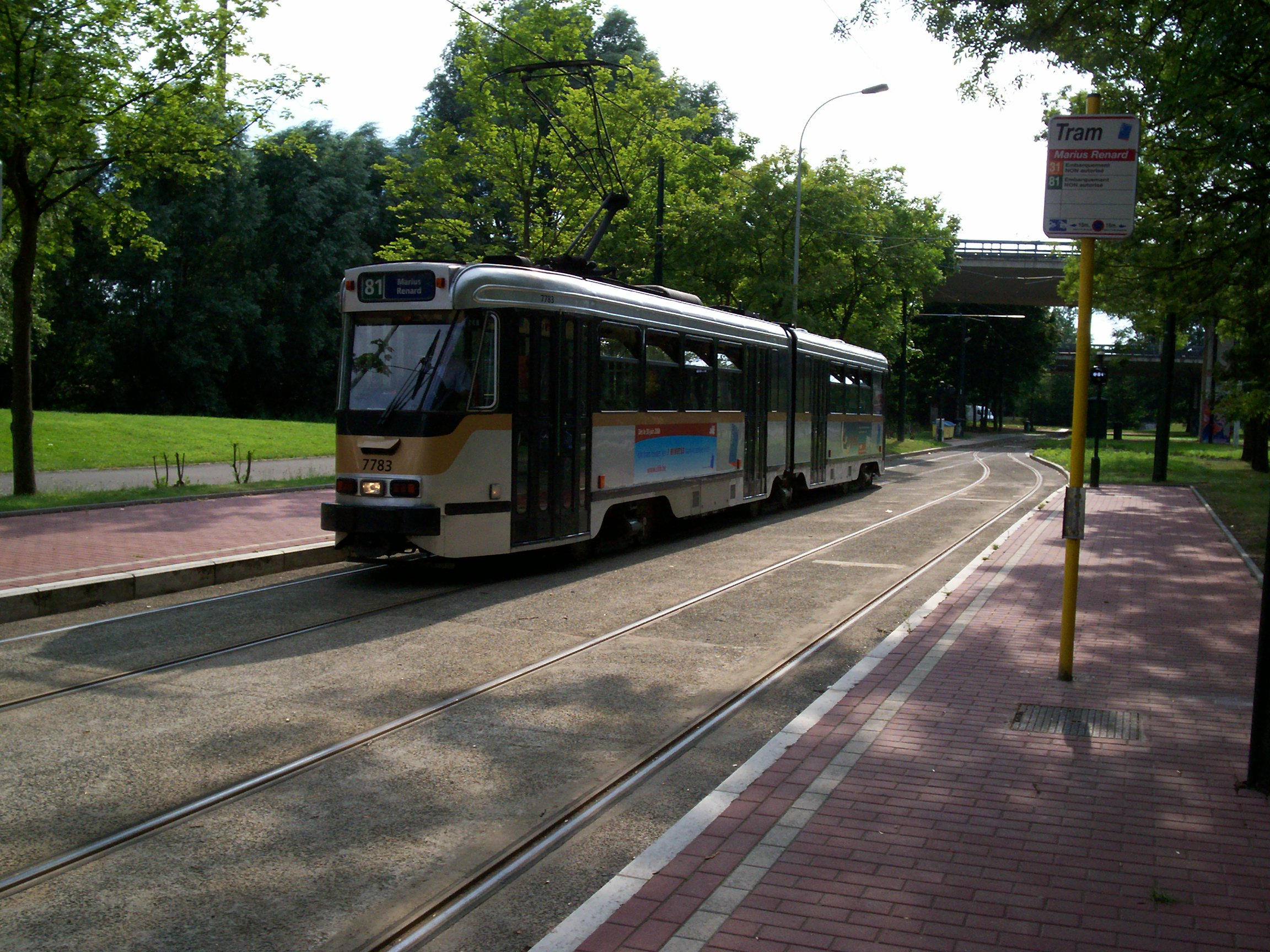 PCC 7700 de la ligne 81 arrivant en station de départ de Marius Renard